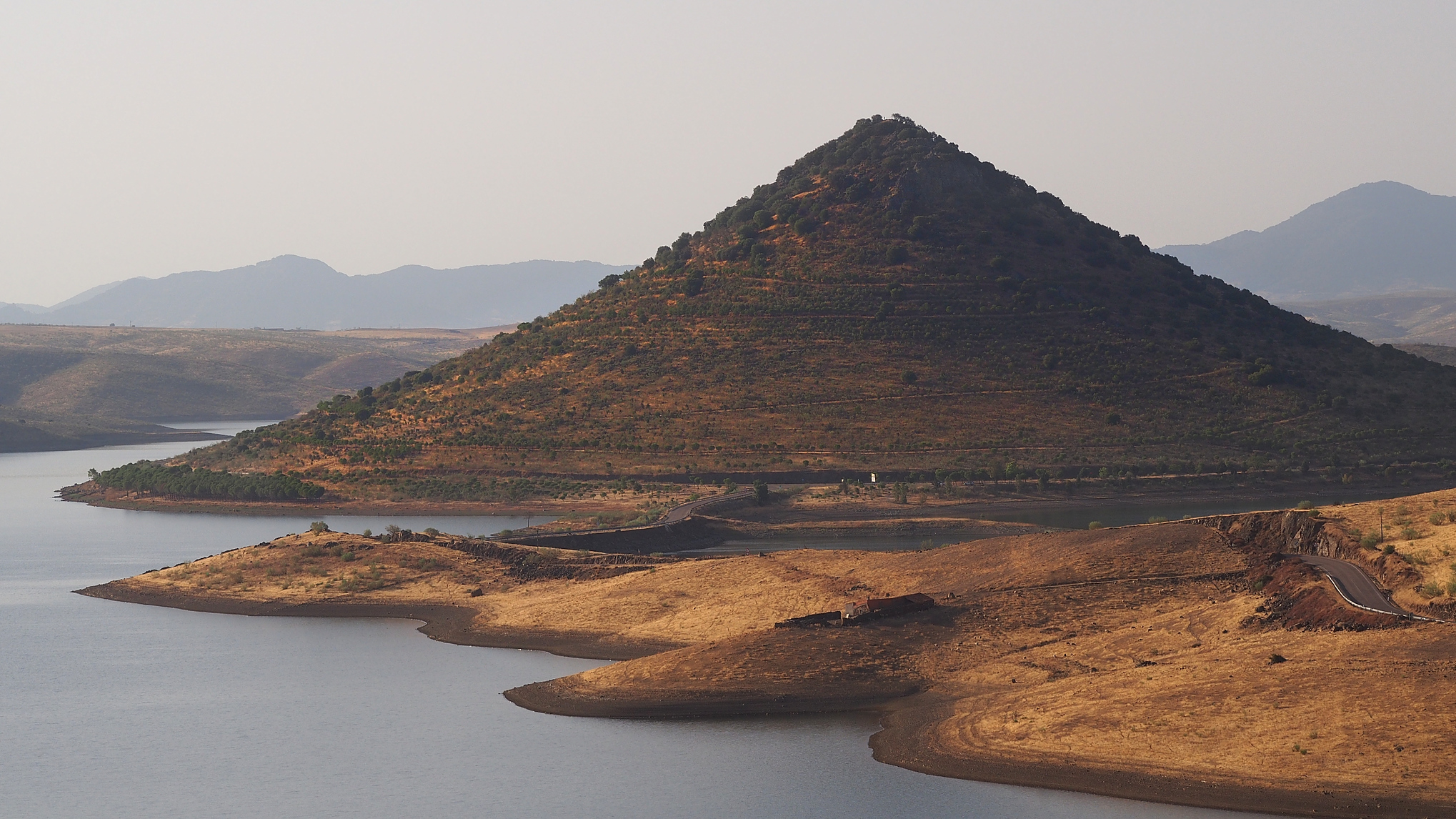 Natural cone hill